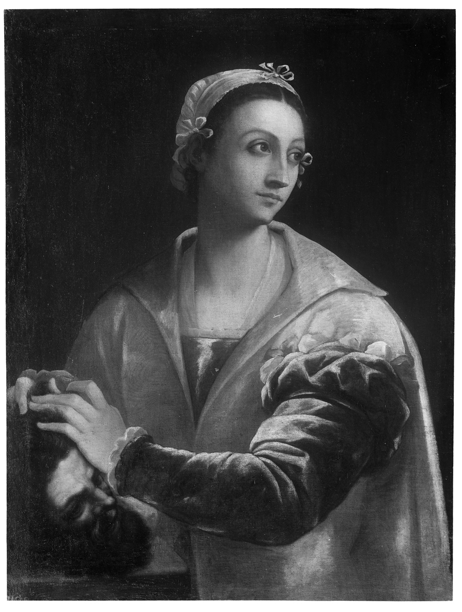 Judith con la cabeza de Holofernes, de Sebastiano del Piombo, pintado hacia 1535-1540. La obra pertenecía al Kaiser Friedrich Museum de Berlín (actualmente llamado Museo Bode) y quedó destruida o desapareció en mayo de 1945, finalizada la Segunda Guerra Mundial en Alemania. - Dimensiones: 94,5 cm x 72 cm - Pintura al óleo sobre lienzo